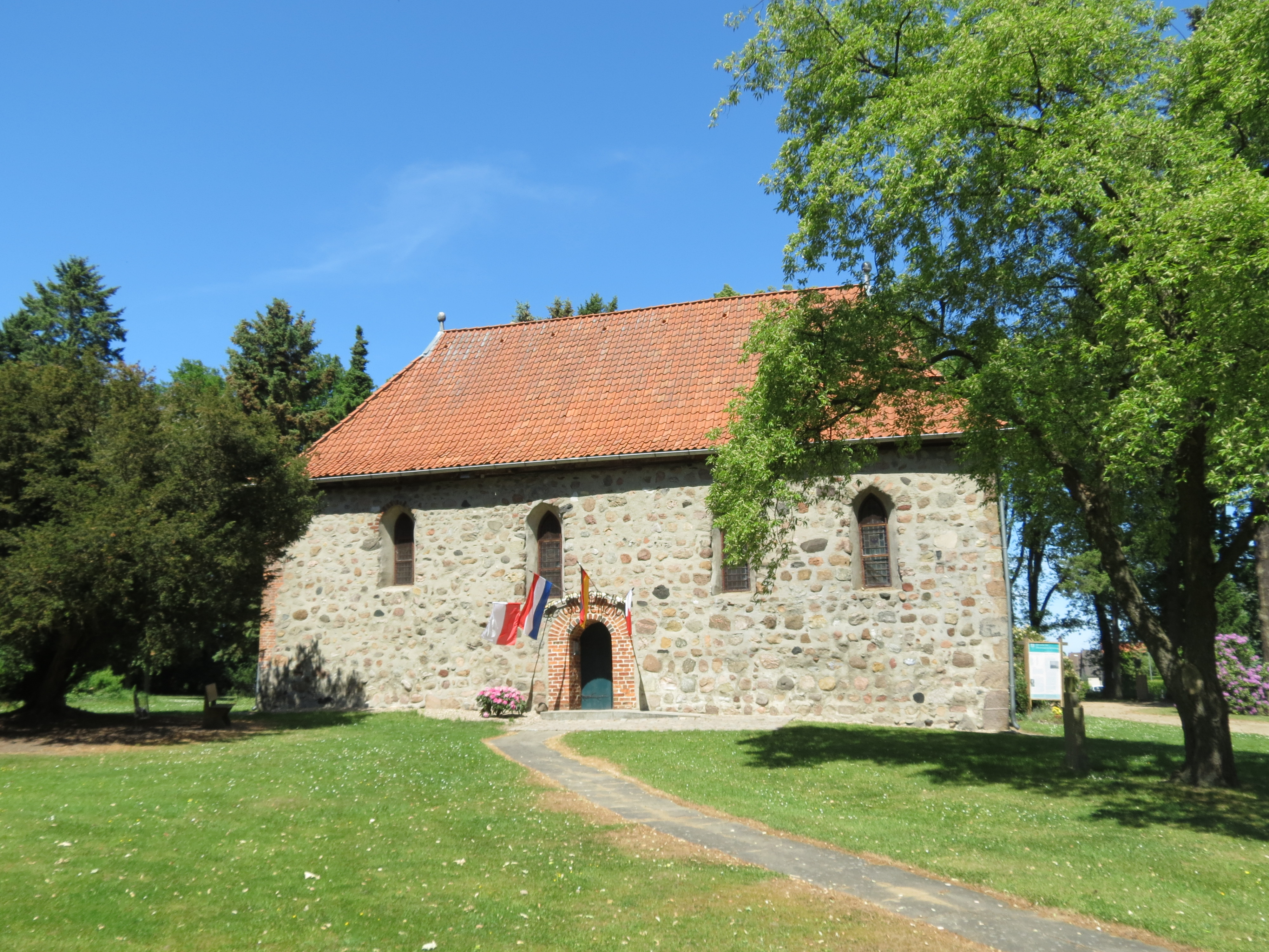 St. Laurentiuskapelle, Dahlenburg, Lkr. Lüneburg, Niedersachsen, Deutschland Es handelt sich hierbei um eine ehemalige Burgkapelle welche seit 1928 als Heimatmuseum dient. Bitte nur noch unter "Dahlenburg" und "Museums in Lower Saxony" kategorisieren!